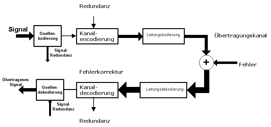 Zusammenhang Quellkodierung, Kanalkodierung, Leitungskodierung